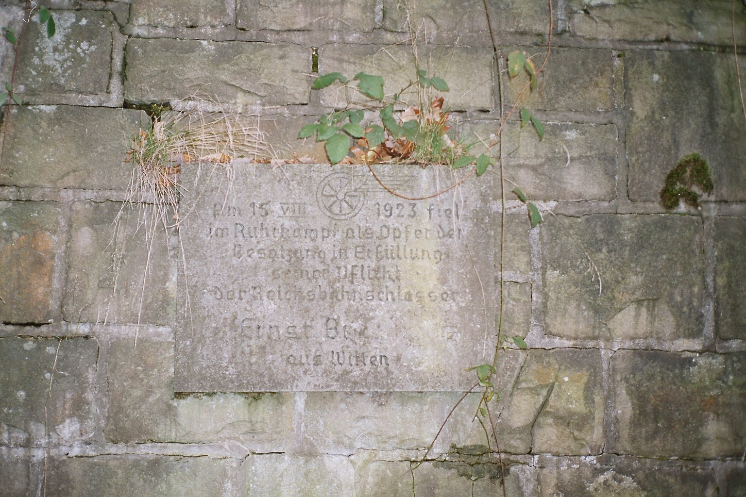 Gedenktafel für ein Opfer der Ruhrbesetzung 1923 an einer Unterführung (seit 2006 Fußgängertunnel/Ruhrtalradweg) der Ruhrtalbahn in Wengern, Wetter (Ruhr).